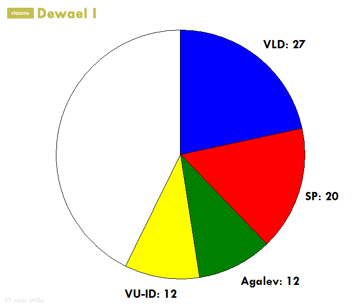 zetelverdeling van de meerderheidscoalitie van de regering regering-Dewael (13 juli 1999 – 5 juni 2003)